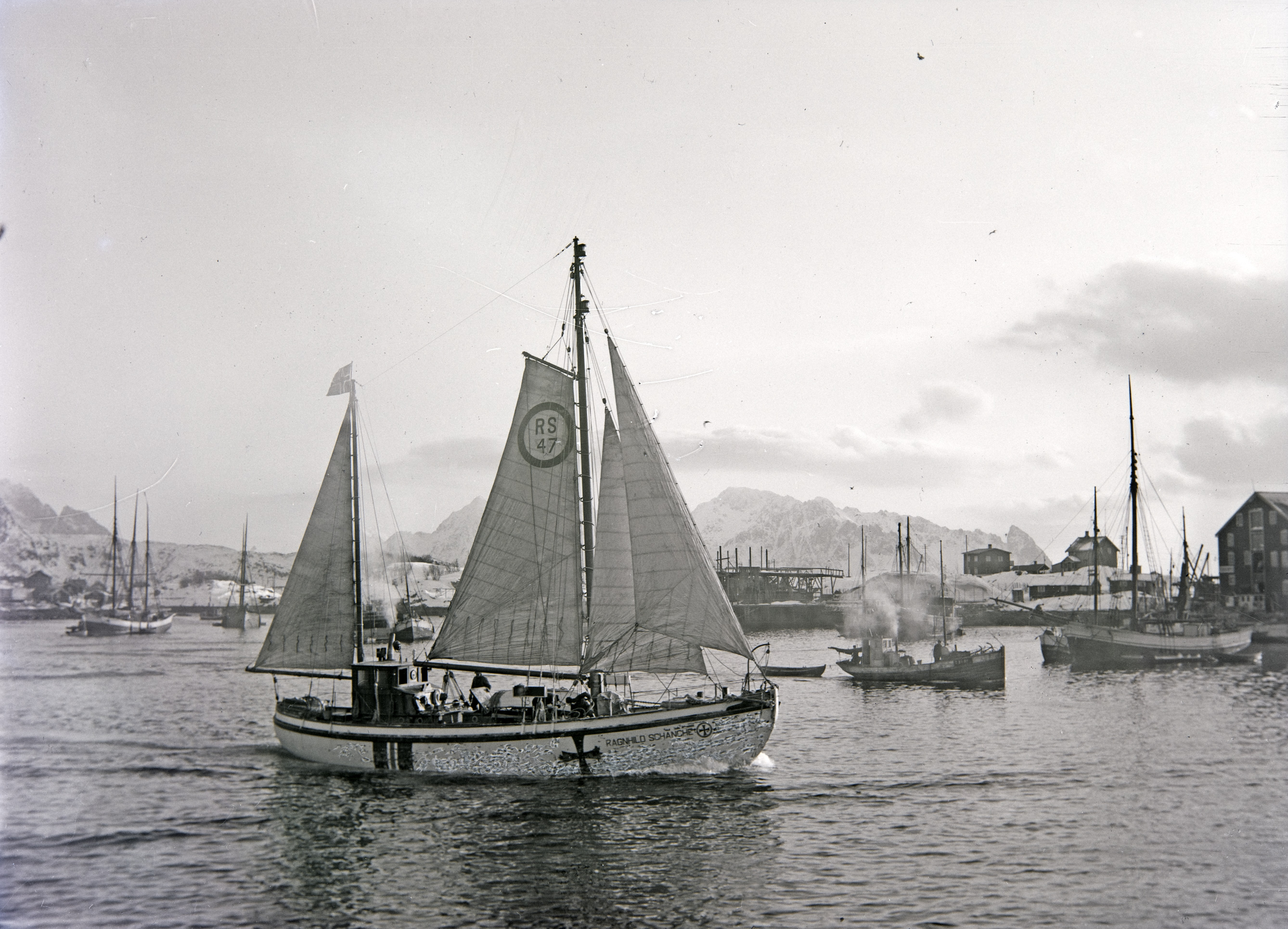 Bildet er hentet fra Nordlandsmuseet bildesamling etter Kanstad. Motivbeskrivelse: R/S "Ragnhild Schanche" Nøkkelord: Topografi og geologi Båter og fartøyer Fartøyer Sikkerhet til sjøs, redning, berging Havnevesen Egennavn på dyr og ting